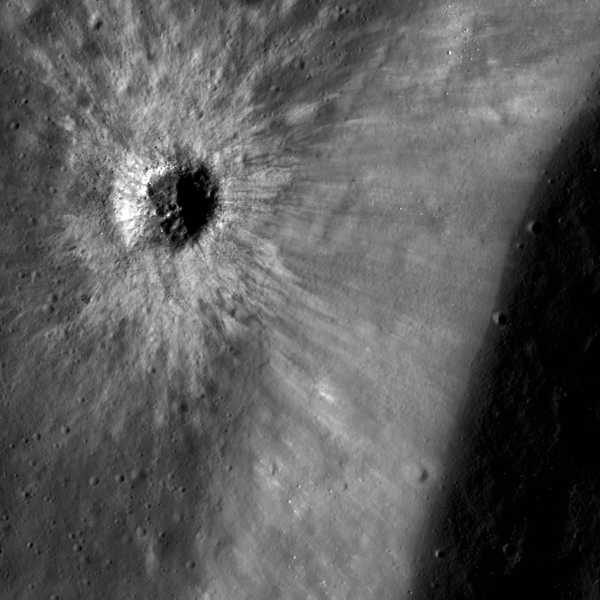 杨环形山的照片